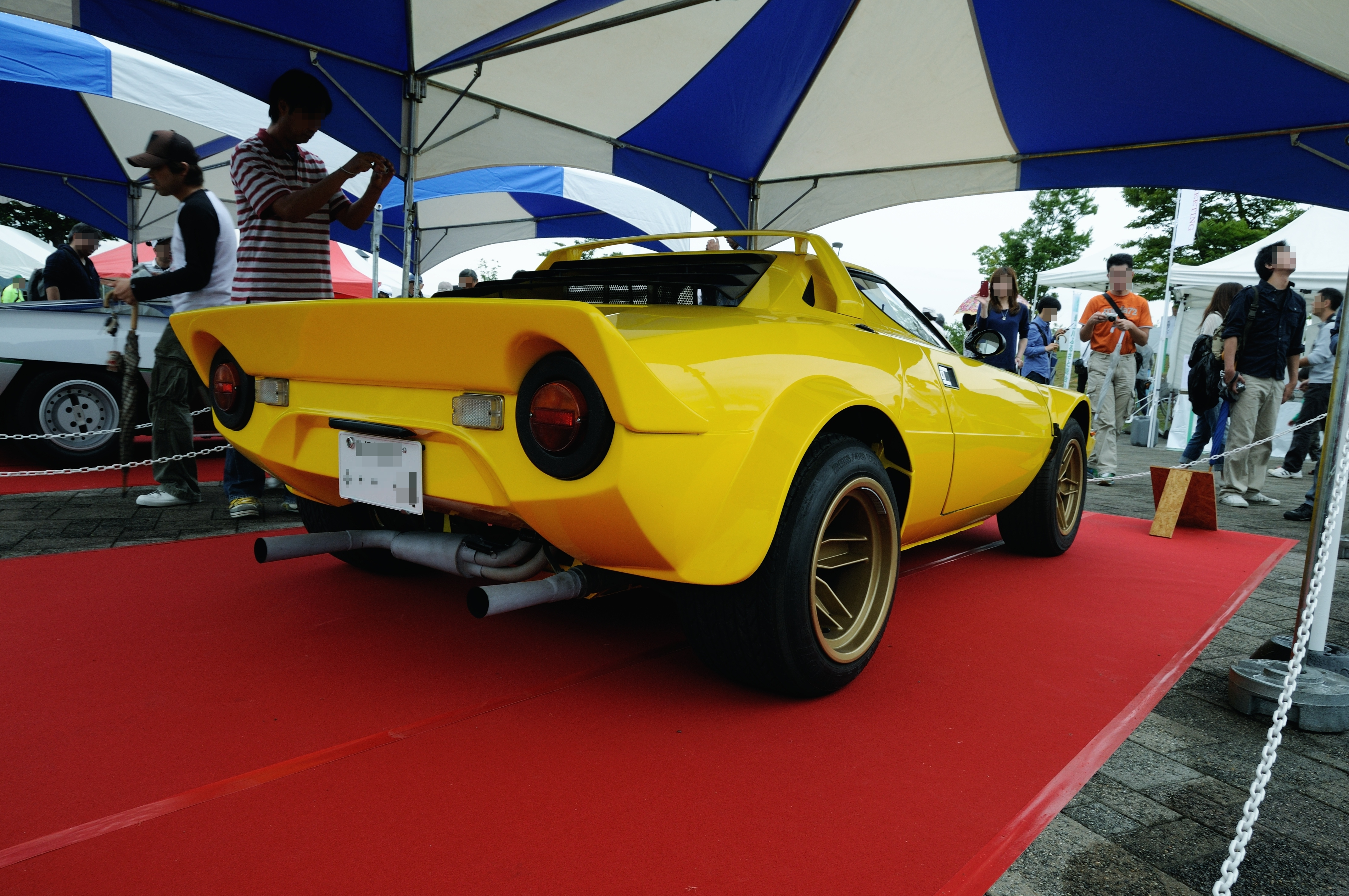 Lancia STRATO'S